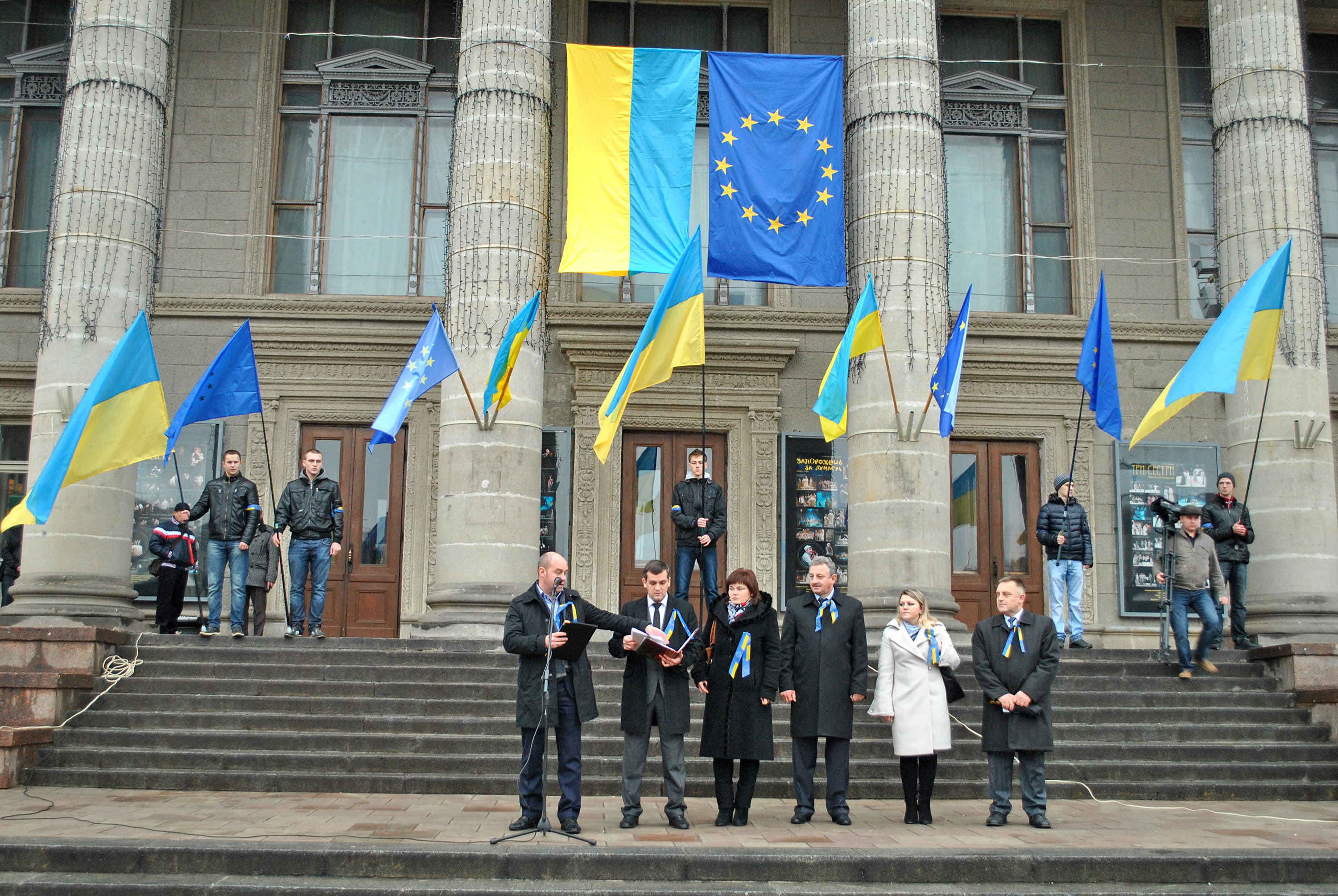 Євромайдан у Тернополі. 24 листопада 2013 року. На імпровізованій сцені міський голова Тернополя Сергій Надал, секретар Тернопільської міськради Ігор Турський, депутати Тернопільської міськради Ірина Бурда, Петро Мандзій, невідома та Петро Гринчишин.